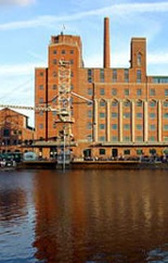 Sitz der ARG im Duisburger Innenhafen